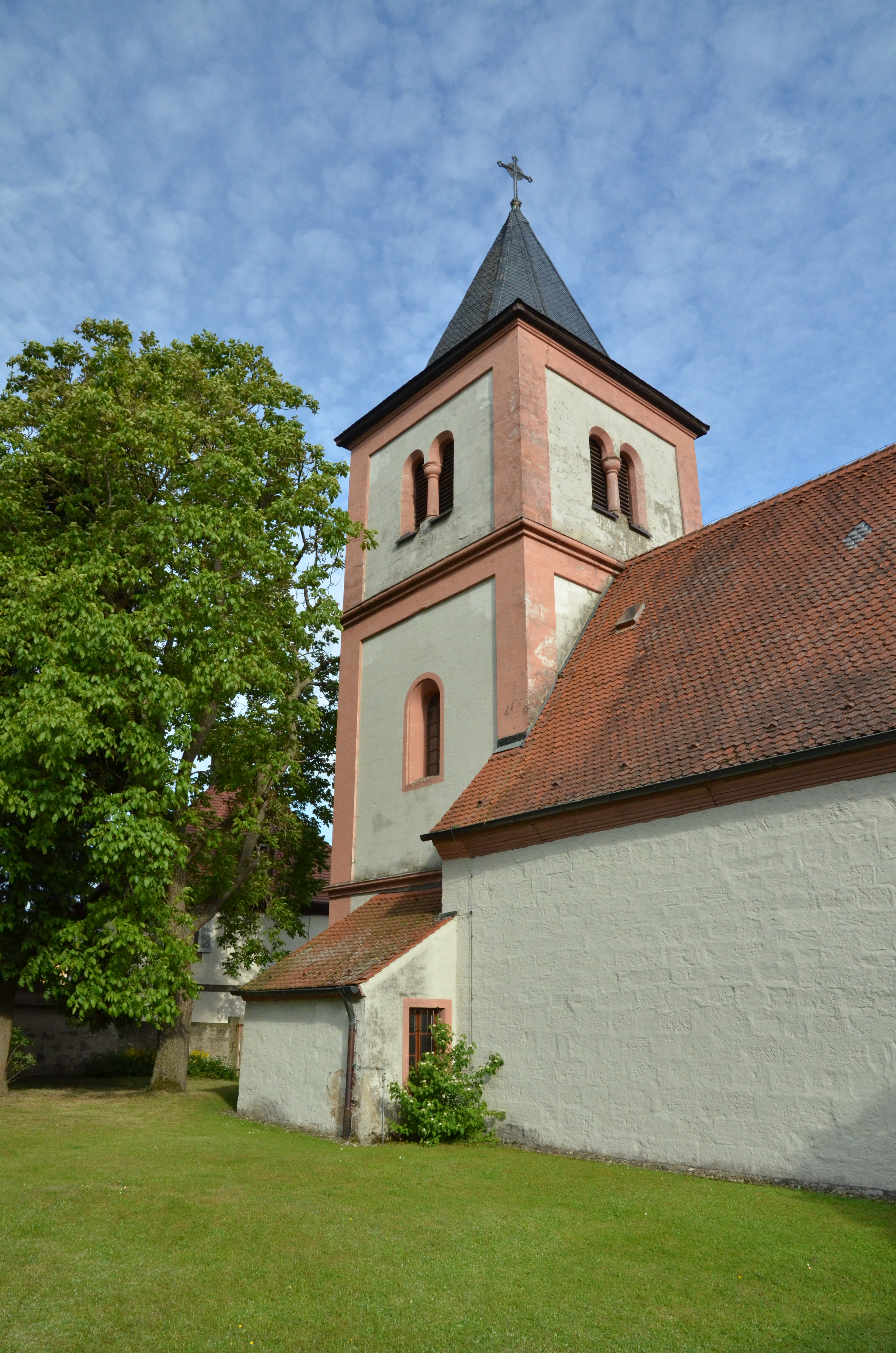 evang.-luth. Kirche St. Kilian in Hagenbüchach